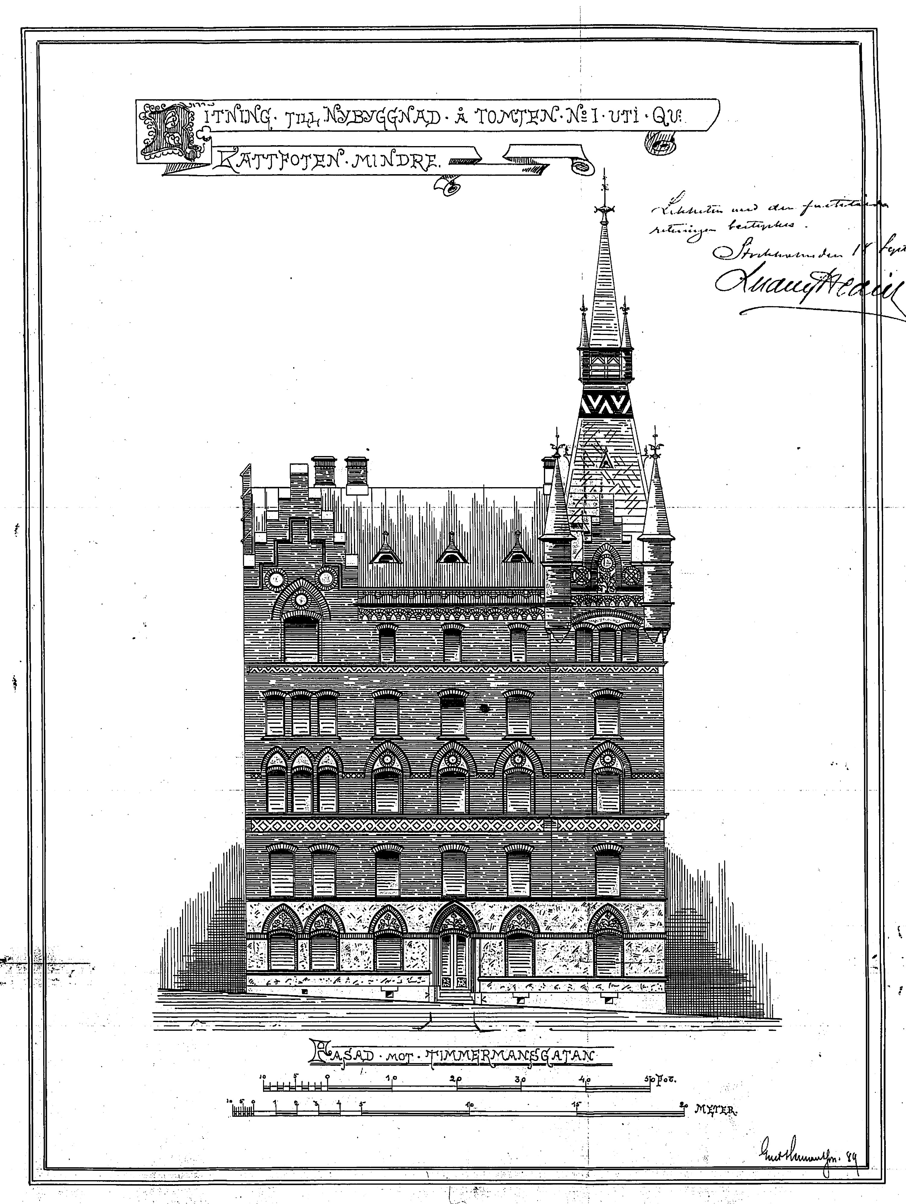 Ritning till Mälarborgen fasad